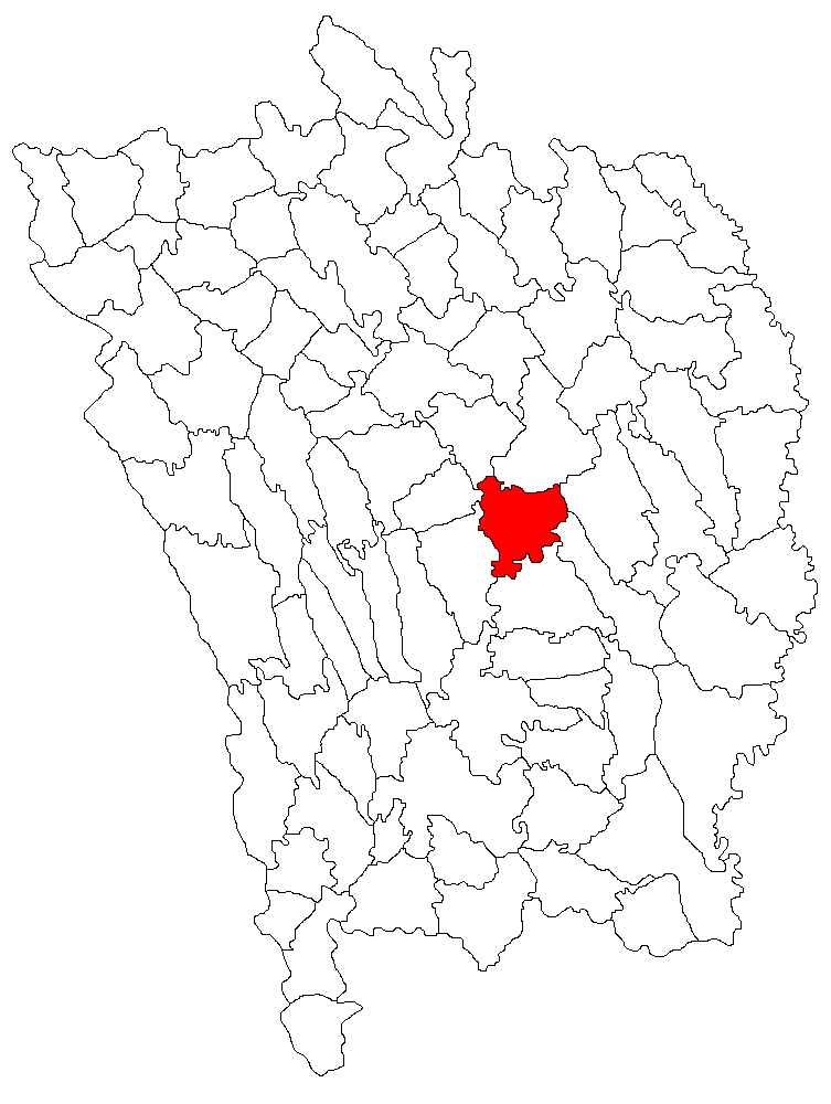 Categorie:Hărţi ale judeţului Vaslui